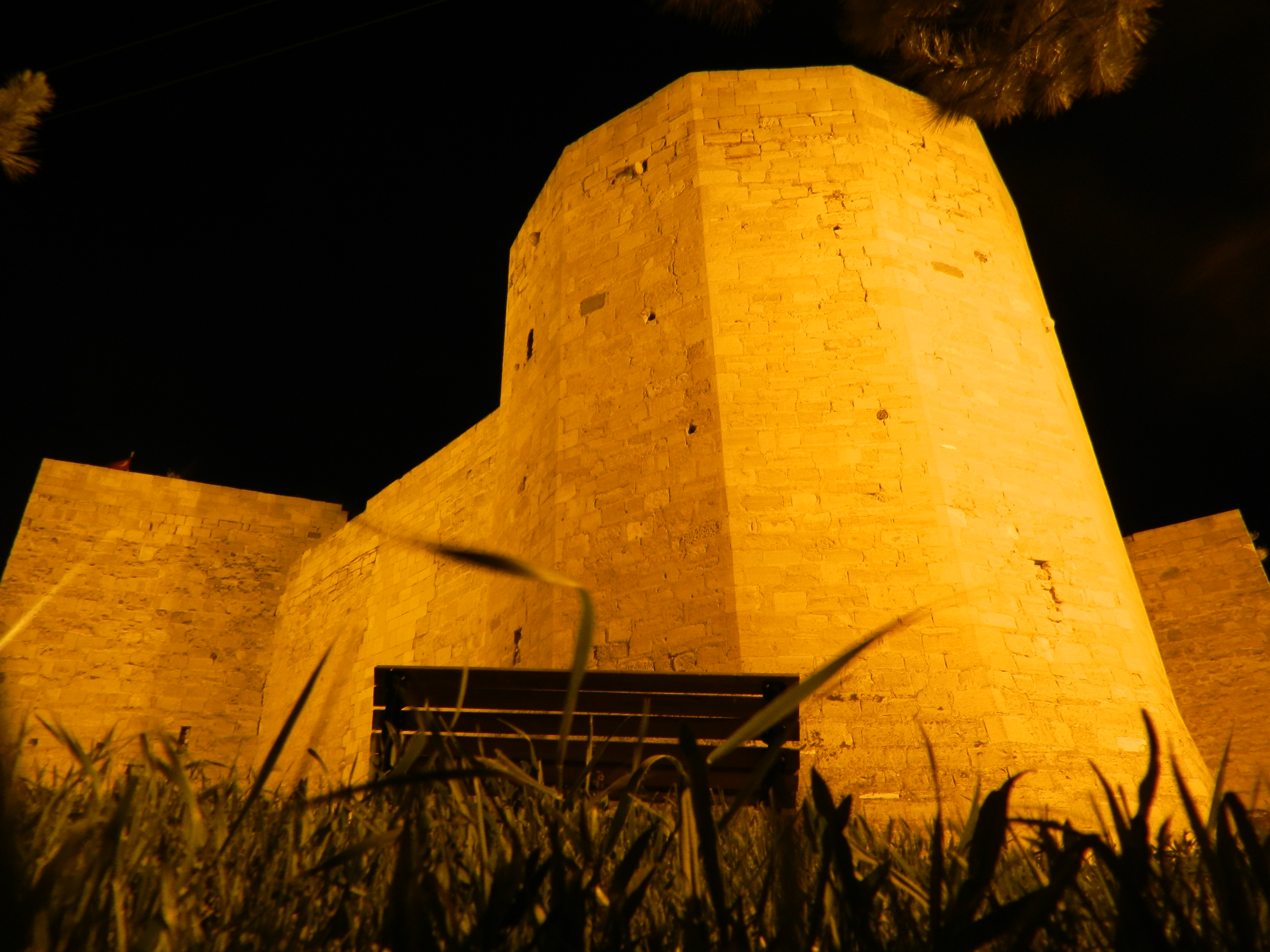 kalenin gece görüntüsü